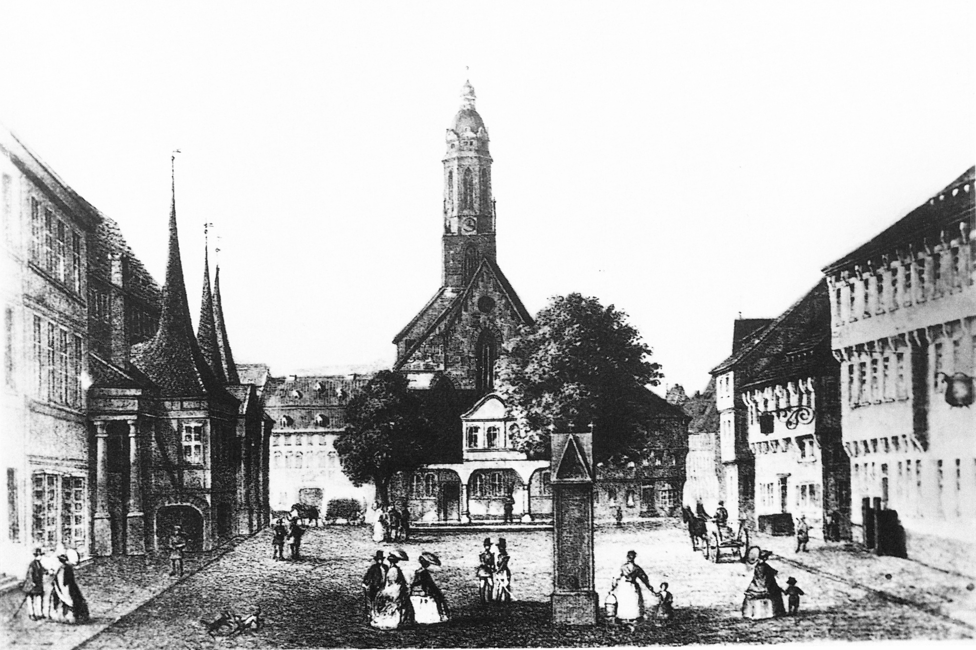 Marktplatz in Einbeck. Stich um 1860.